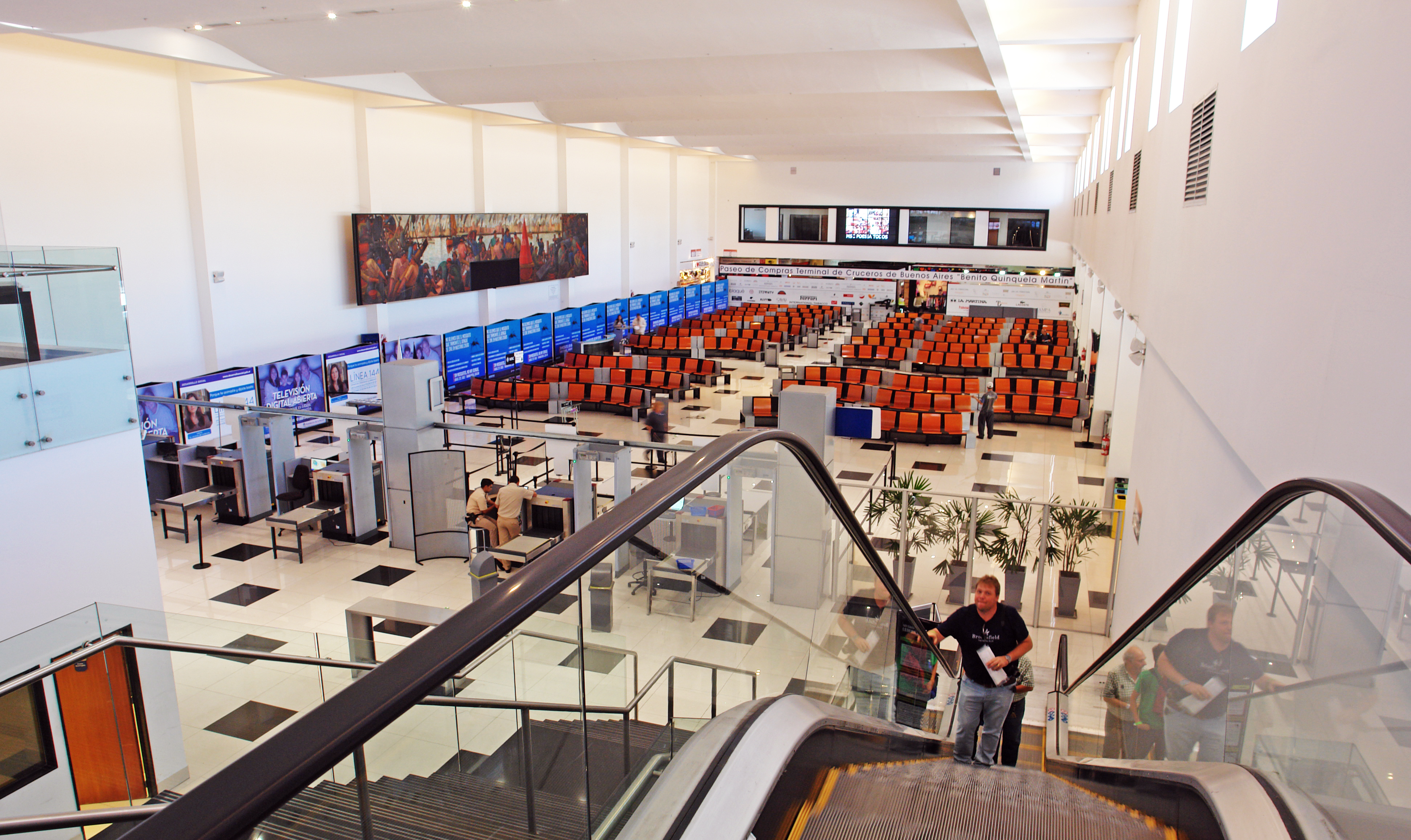 foto de la terminal quinquela martin